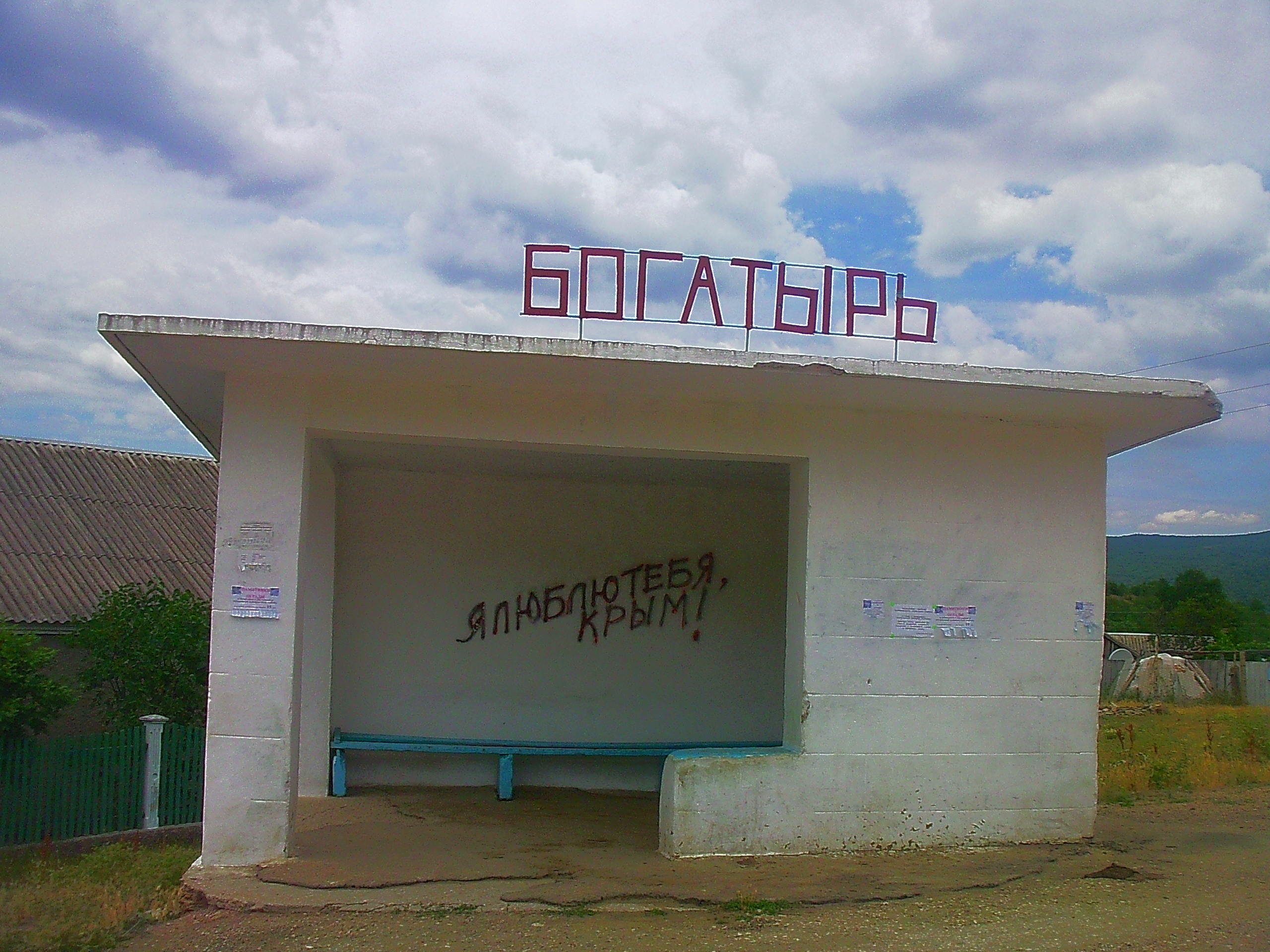 Я люблю тебя, Крым!